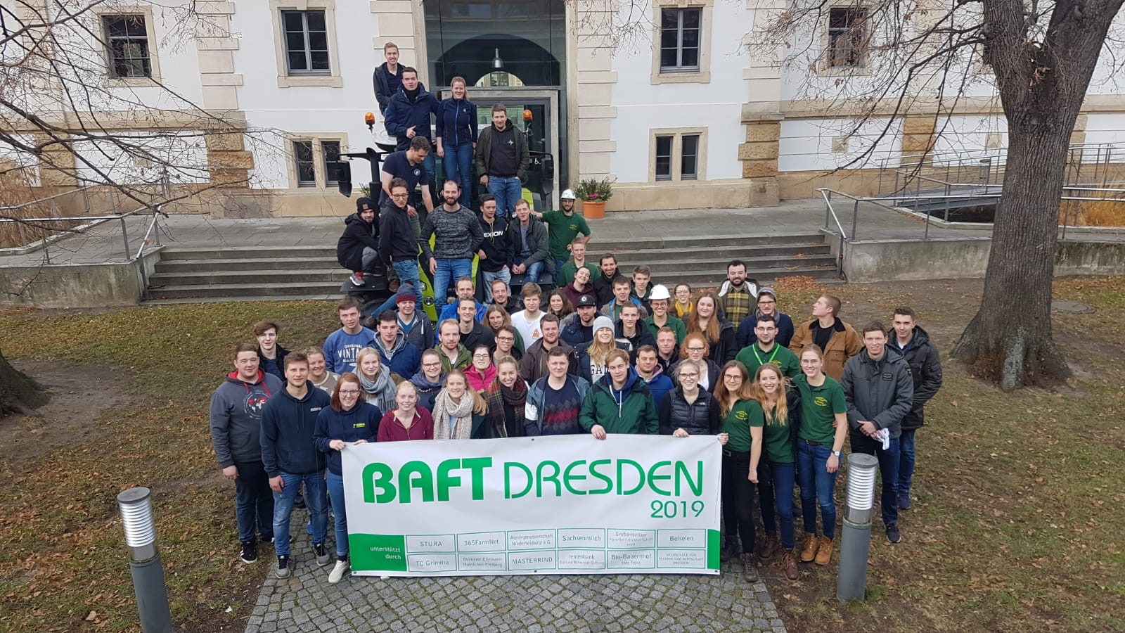 Die Teilnehmer der BAFT in Dresden im Wintersemester 2019/2020 Datum: 08.12.2019 Ort: Dresden-Pillnitz